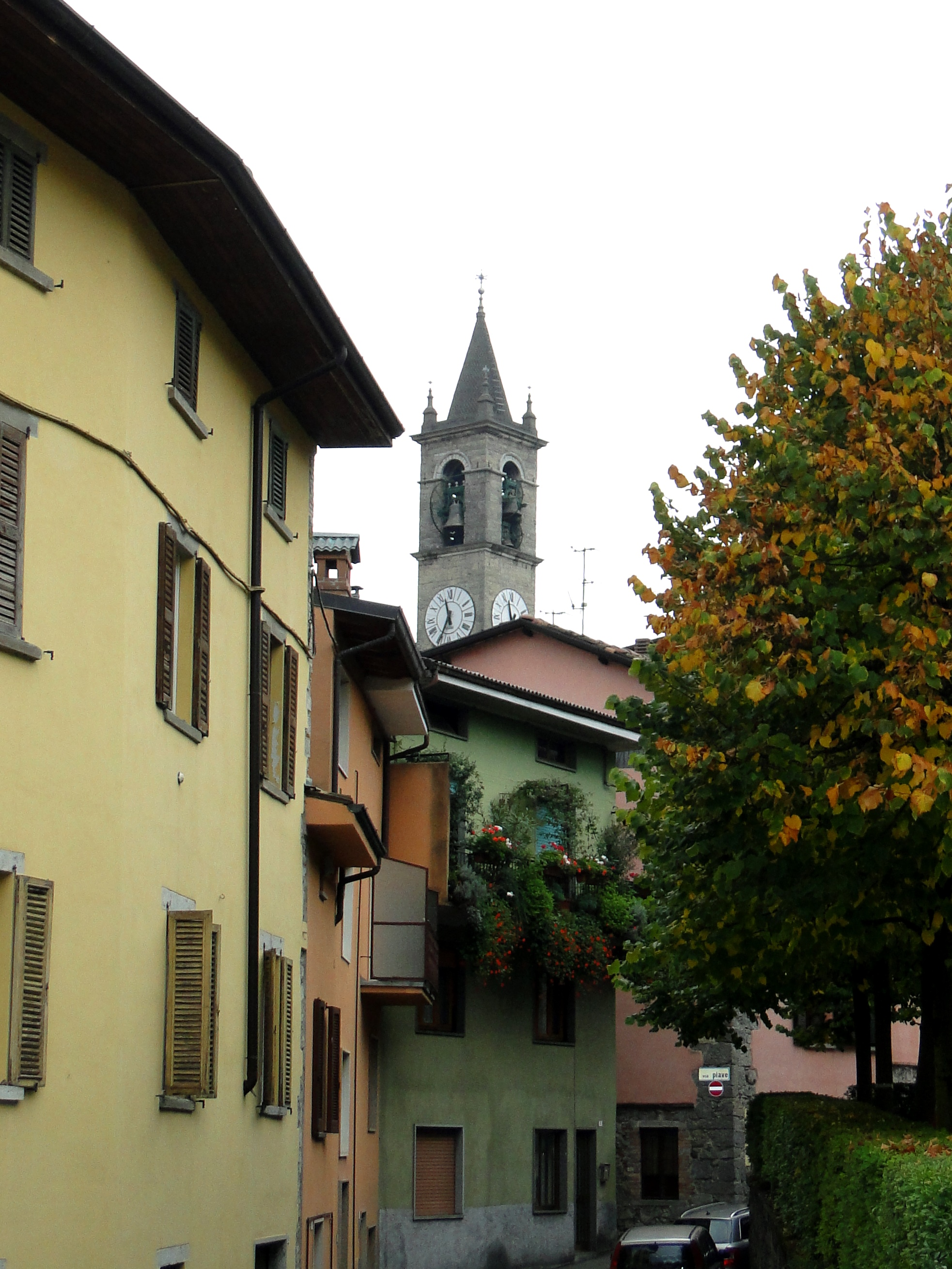 Fiorano al Serio (BG). Scorcio